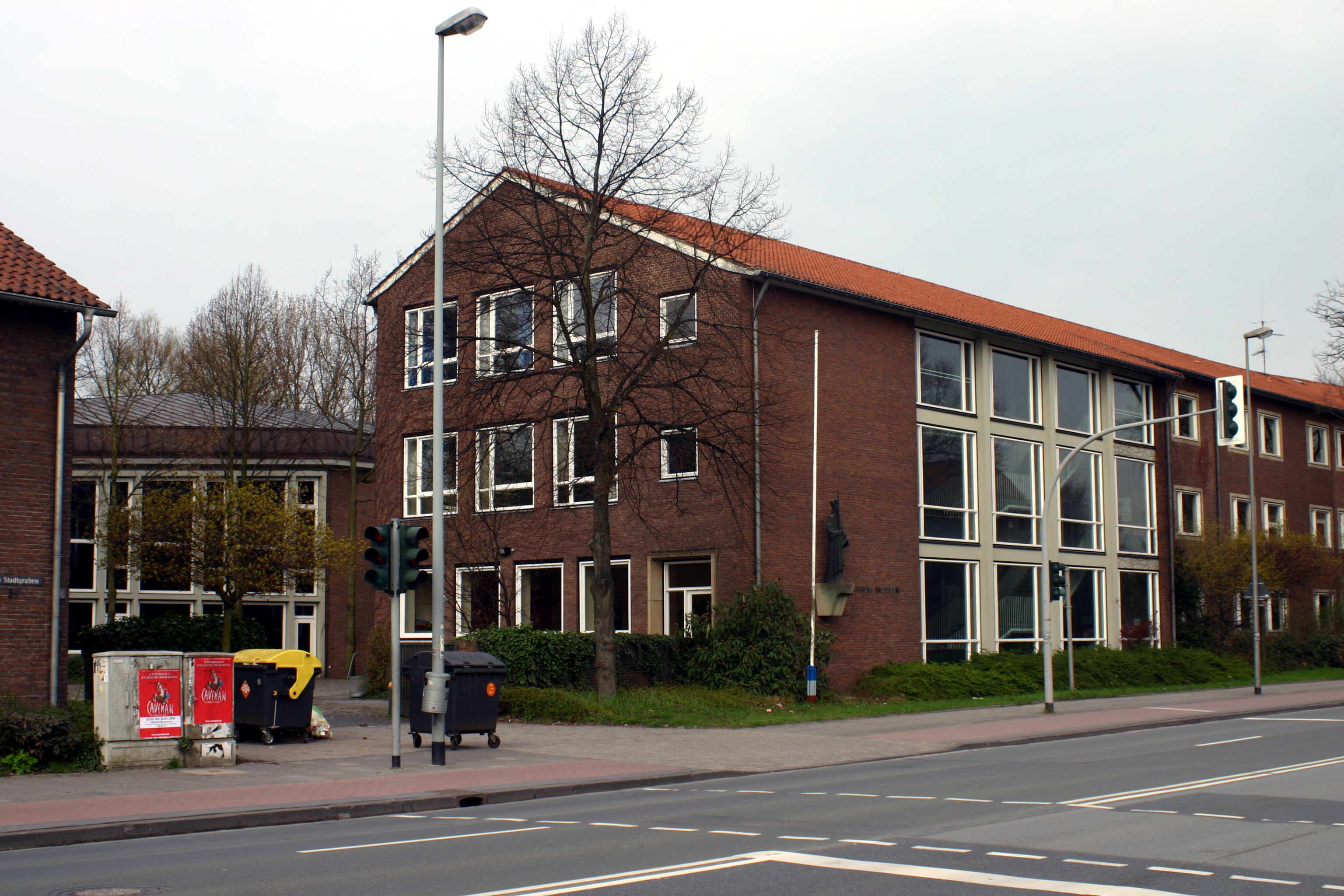 Das Gymnasium Paulinum im westfälischen Münster